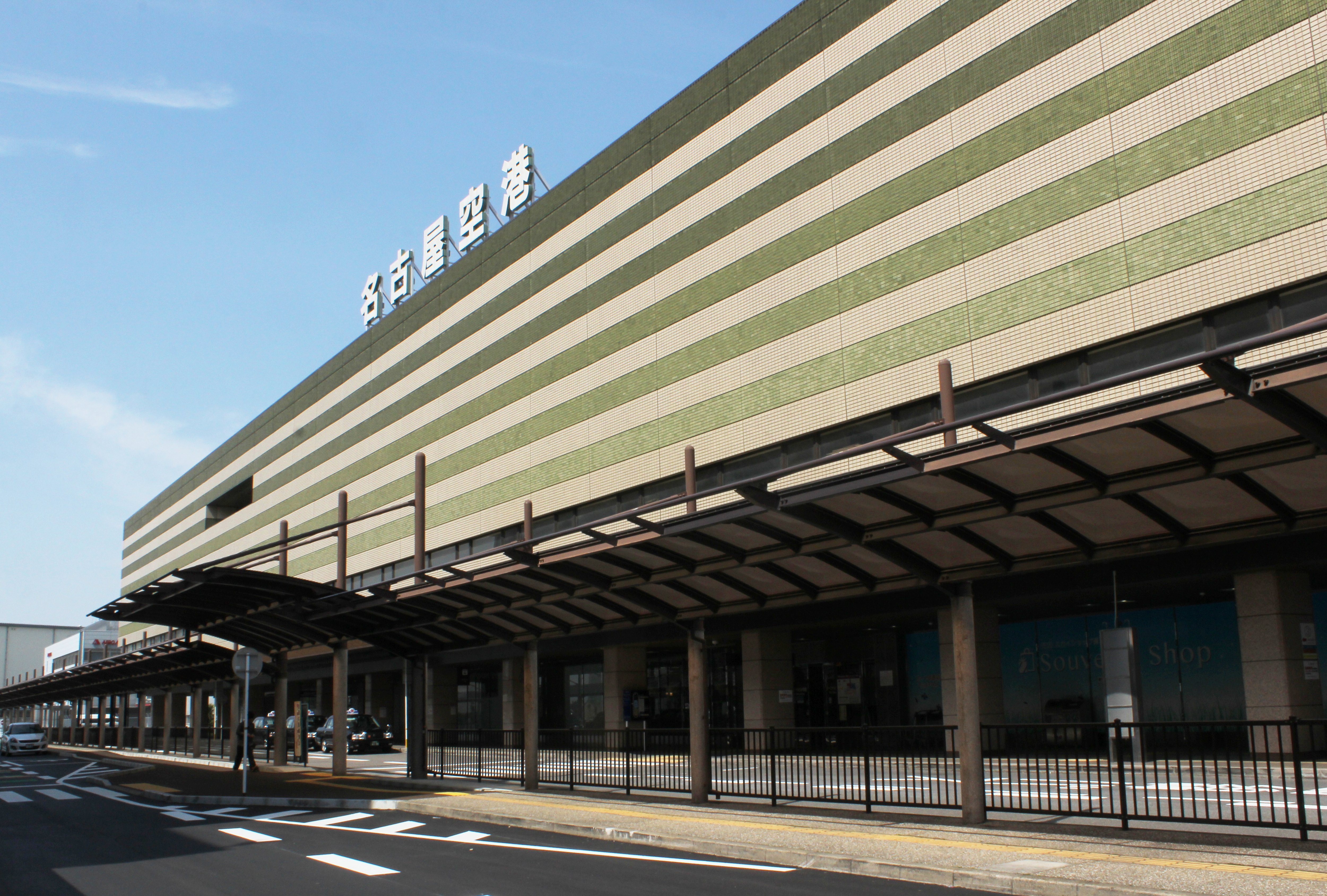 名古屋空港ターミナルビル